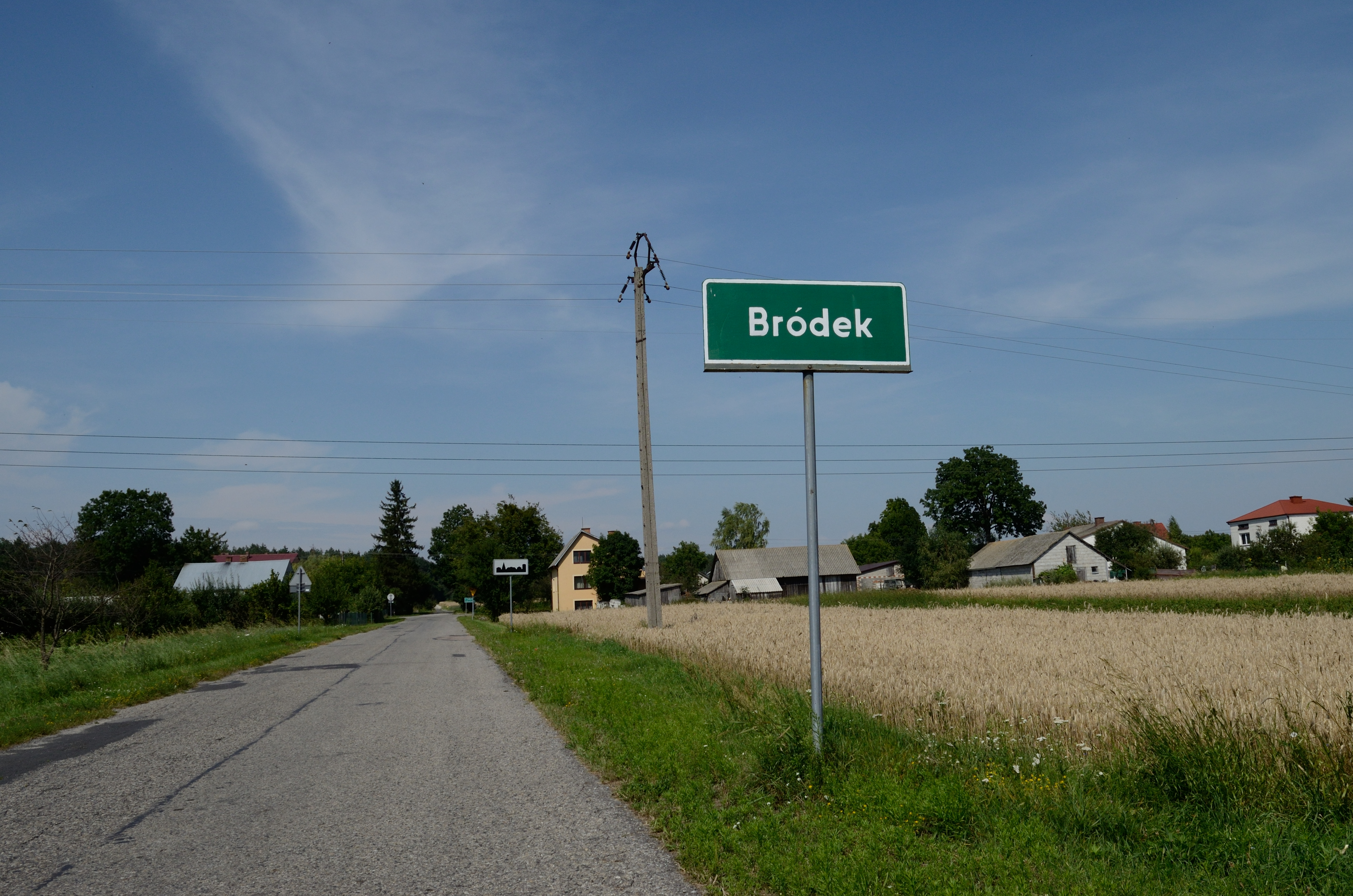 Hranice obce Bródek, Polsko